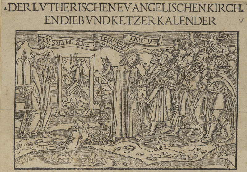 Titelbild eines satirischen Wandkalender aus Luzern (1527). Abgewandelt nach einer Vorlage von Hans Holbein (Christus vera lux) .